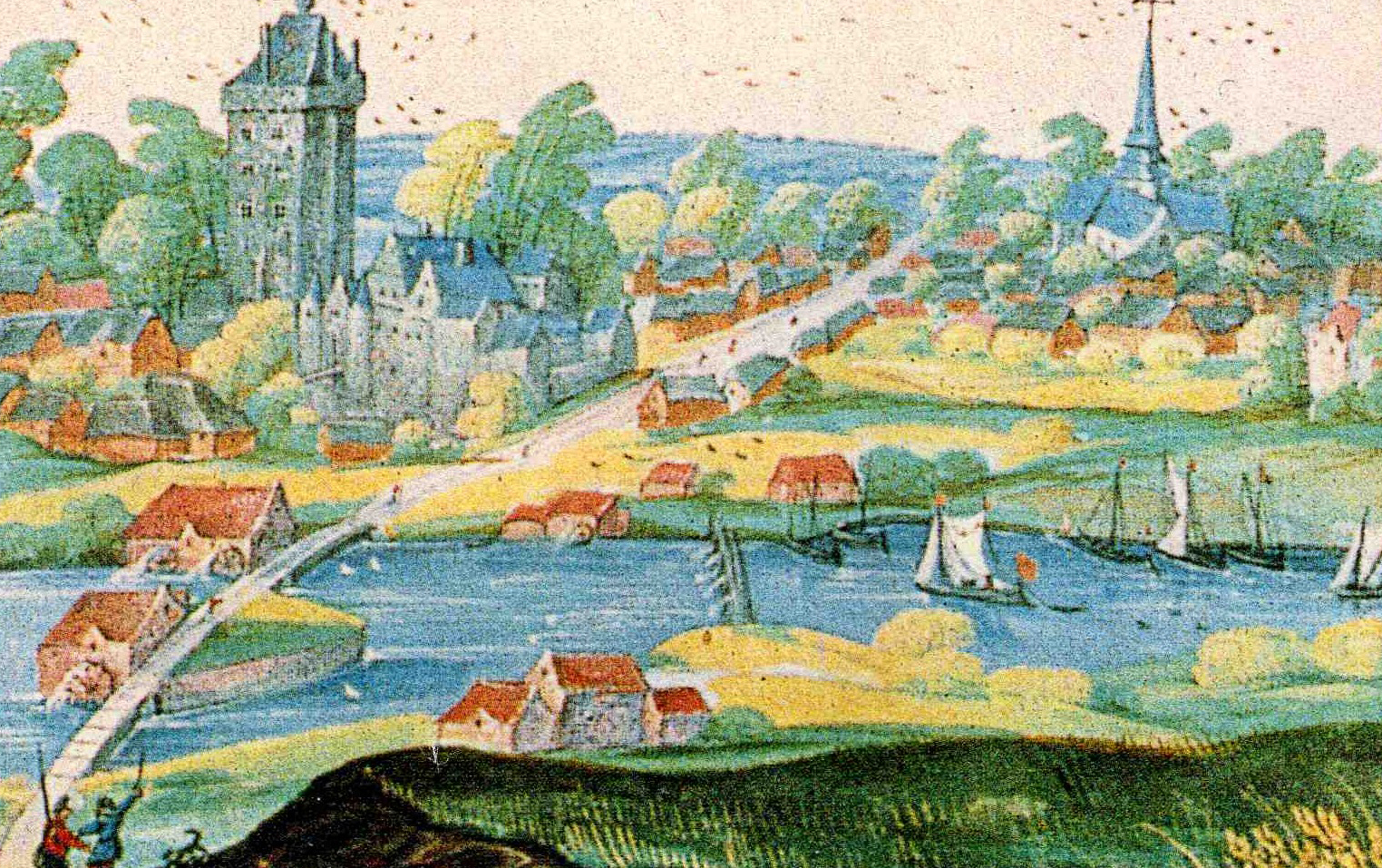 Le chateau fort et les moulins d'Houplines (Album de Croy) début XVIIème (légende supprimée lors du recadrage : Houplines sur la Lis, près d'Armentières, département du Nord (France). Le village d'Houplines, dessin à la gouache, Prague (Tchécoslovaquie), Bibliothèque de la République Tchèque.